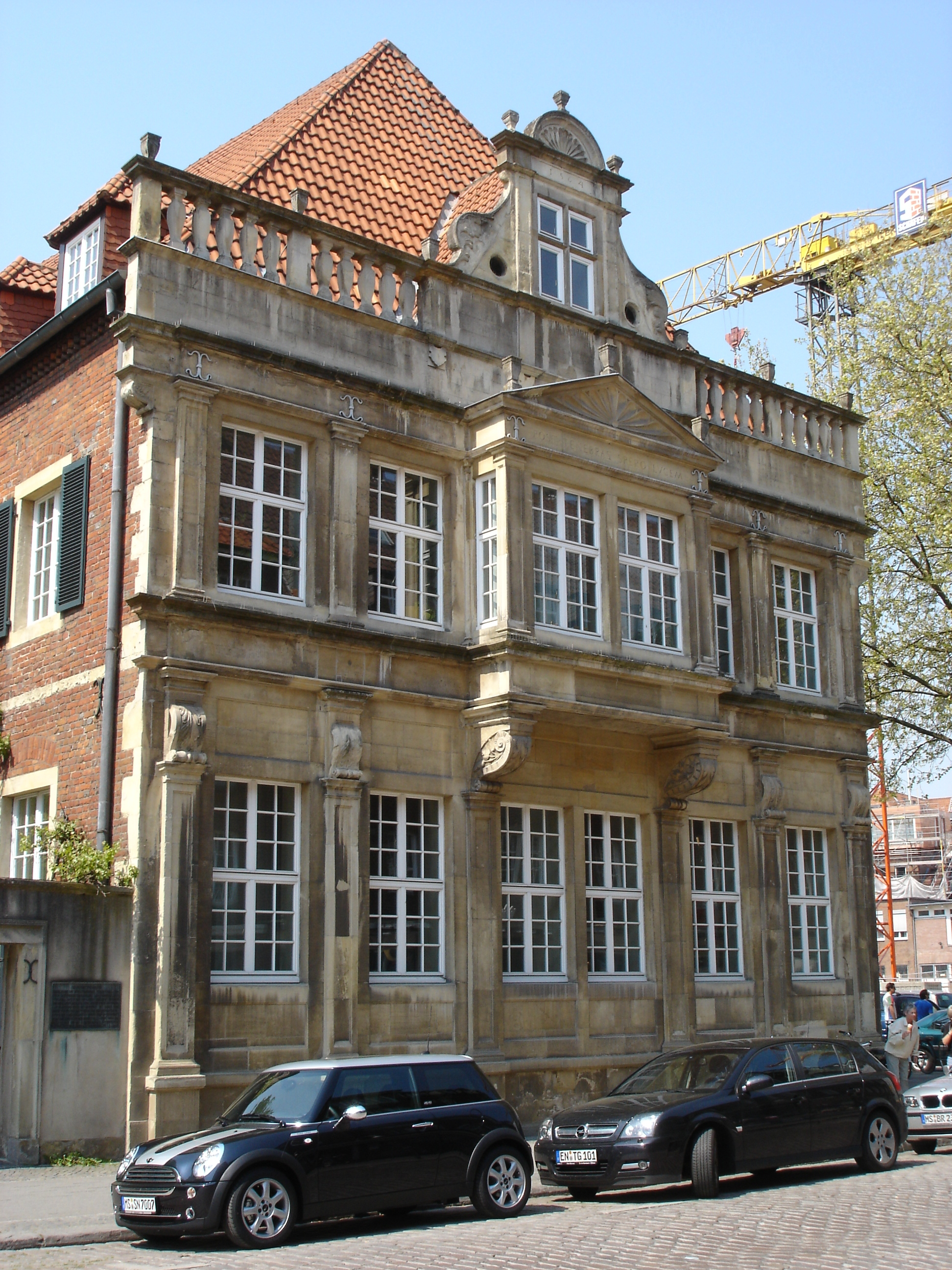 Nebengebäude des Oberverwaltungsgerichts am Heeremanschen Hof in Münster, Westfalen, Deutschland